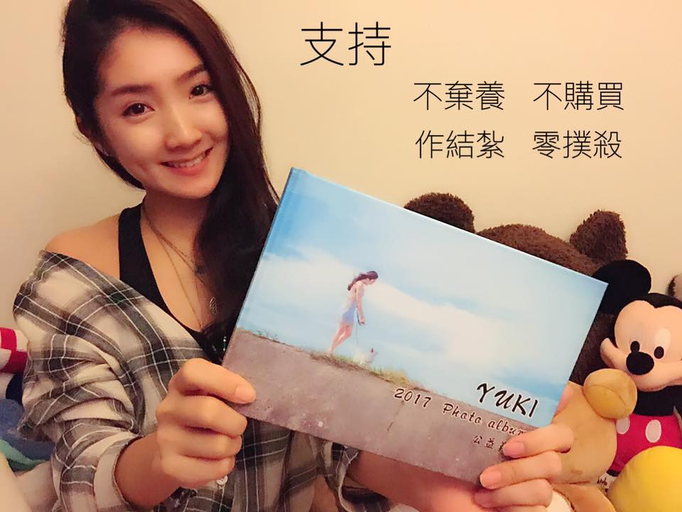 中文（台灣）: 2017許翠雪公益義賣照片